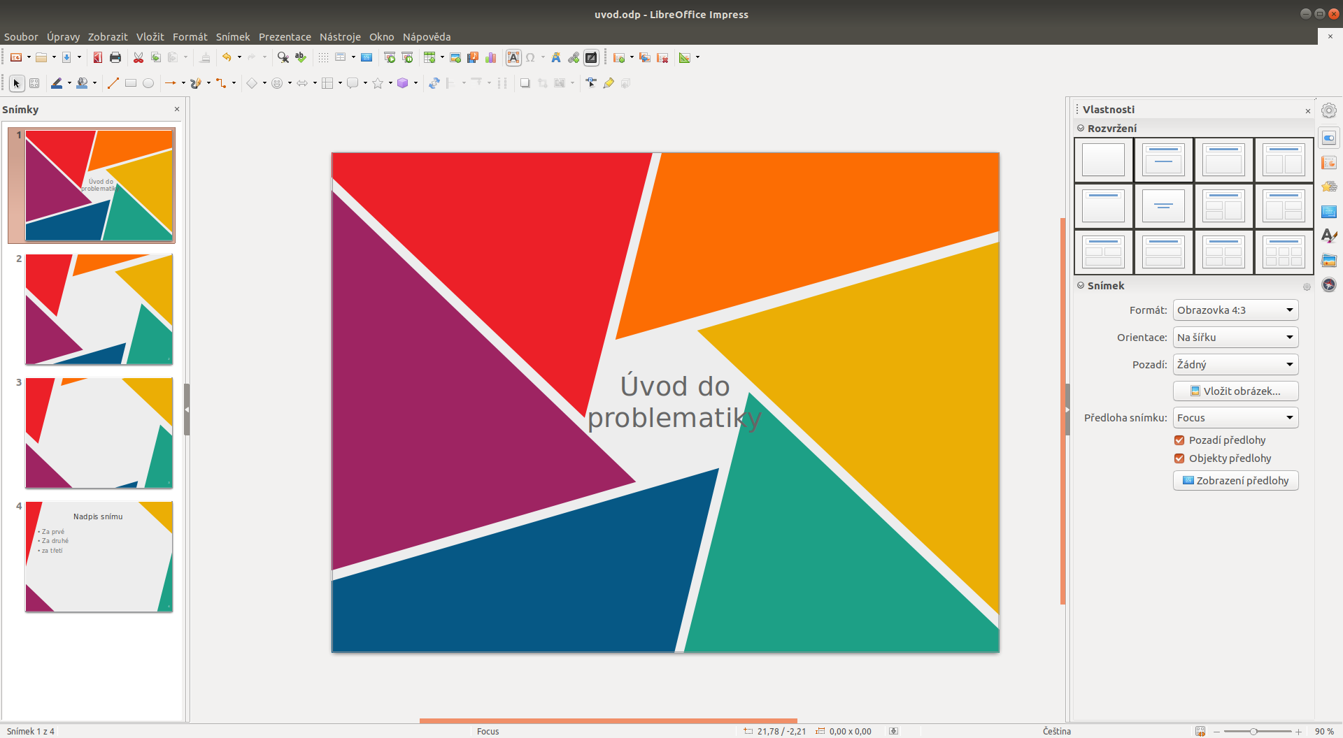 Otisk obrazovky programu LibreOffice Impress verze 6.2 v operačním systému Ubuntu v češtině